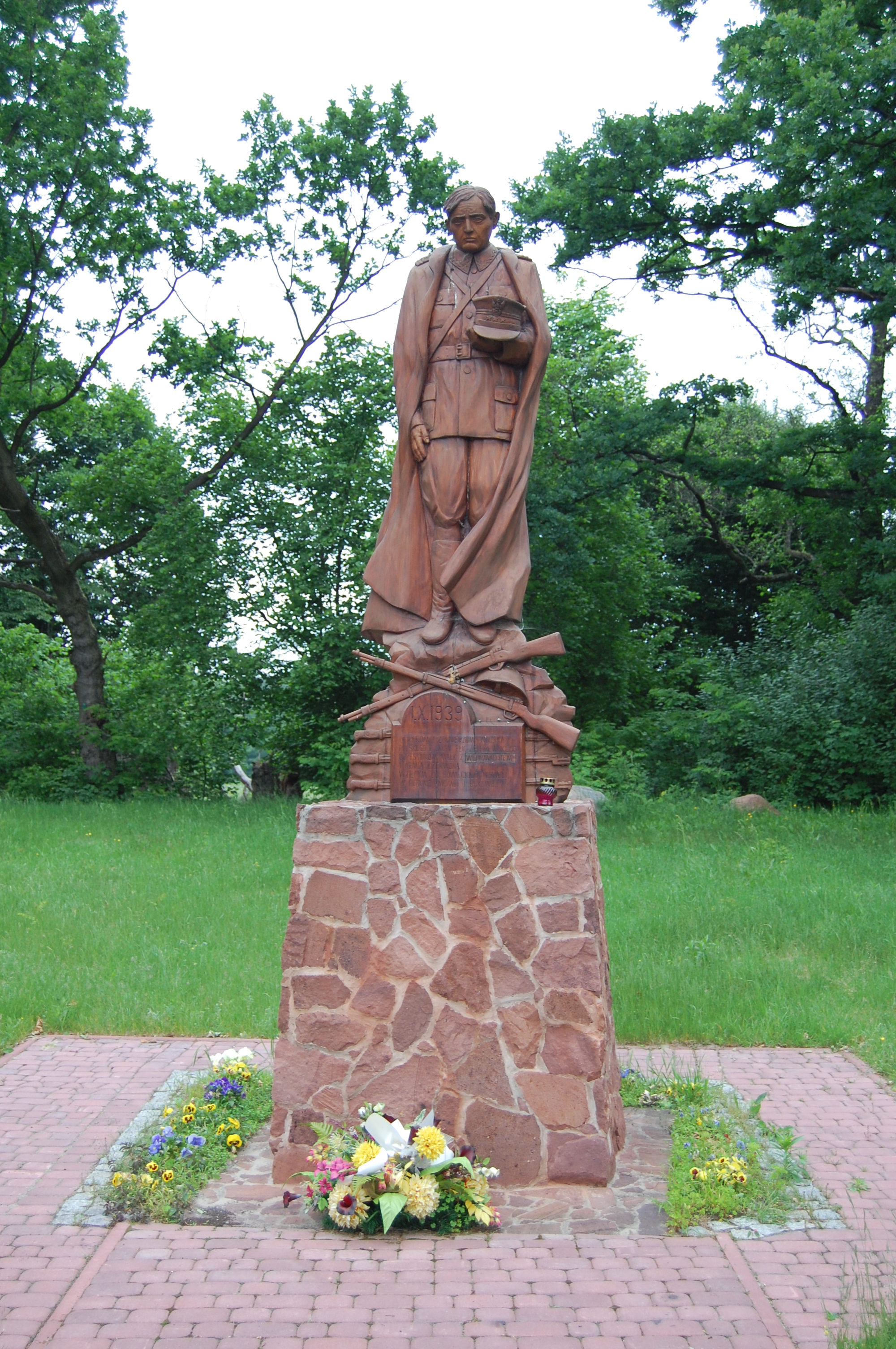 Momoty Górne, pomnik poświęcony oficerom i żołnierzom Wojska Polskiego z grupy pułkownika Tadeusza Kaliny-Zieleniewskiego, uczestnikom walk z 1939 r. z Wehrmachtem i Armią Czerwoną, wziętym do niewoli w rejonie Momot i Bukowej.